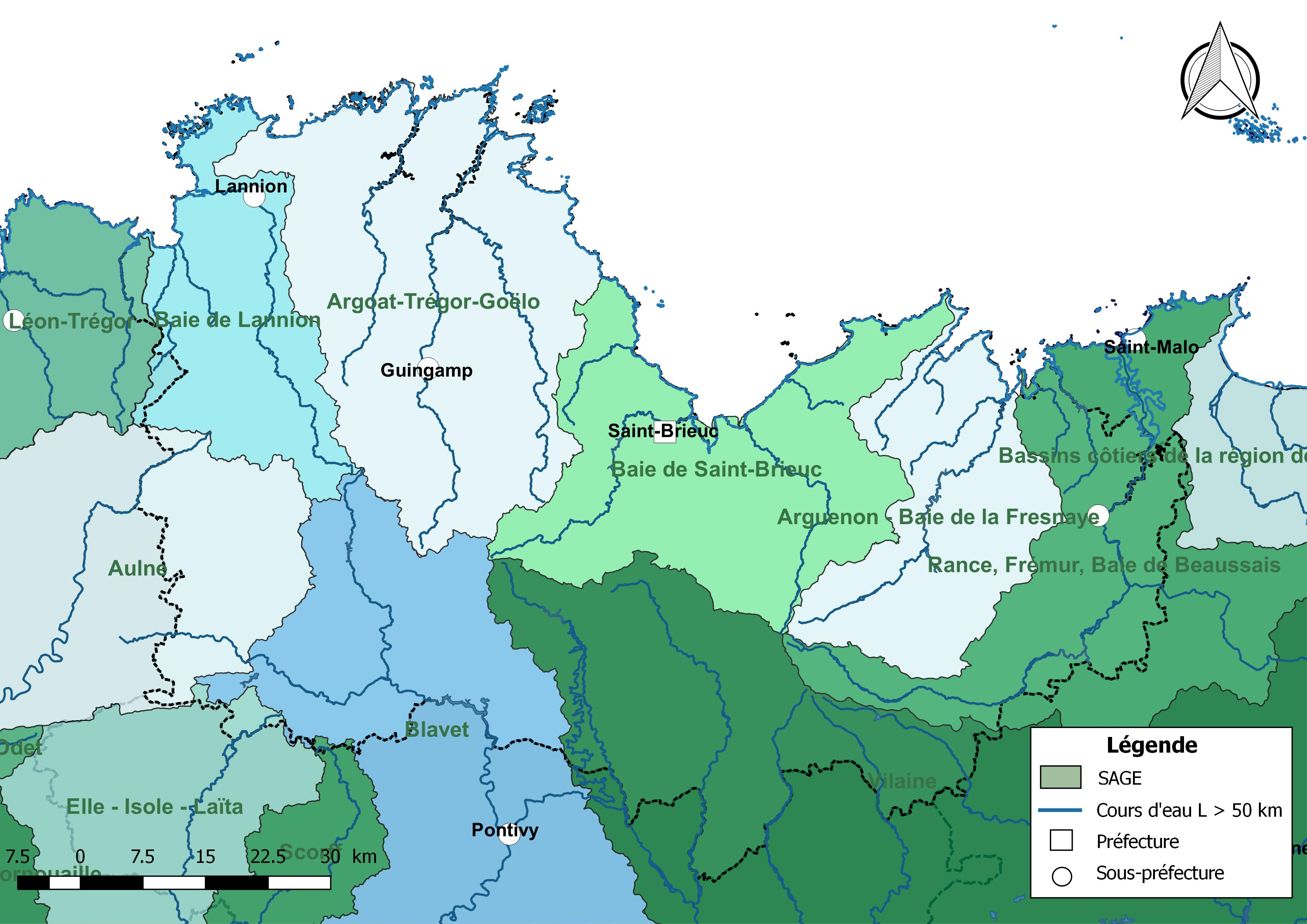 Carte des schémas d'aménagement et de gestion des eaux (SAGE) concernant le département des Côtes-d'Armor (France) au 1er janvier 2018.